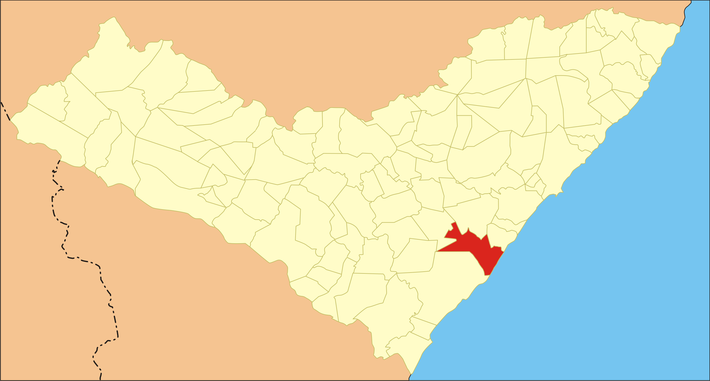 Localização da cidade no estado de Alagoas.